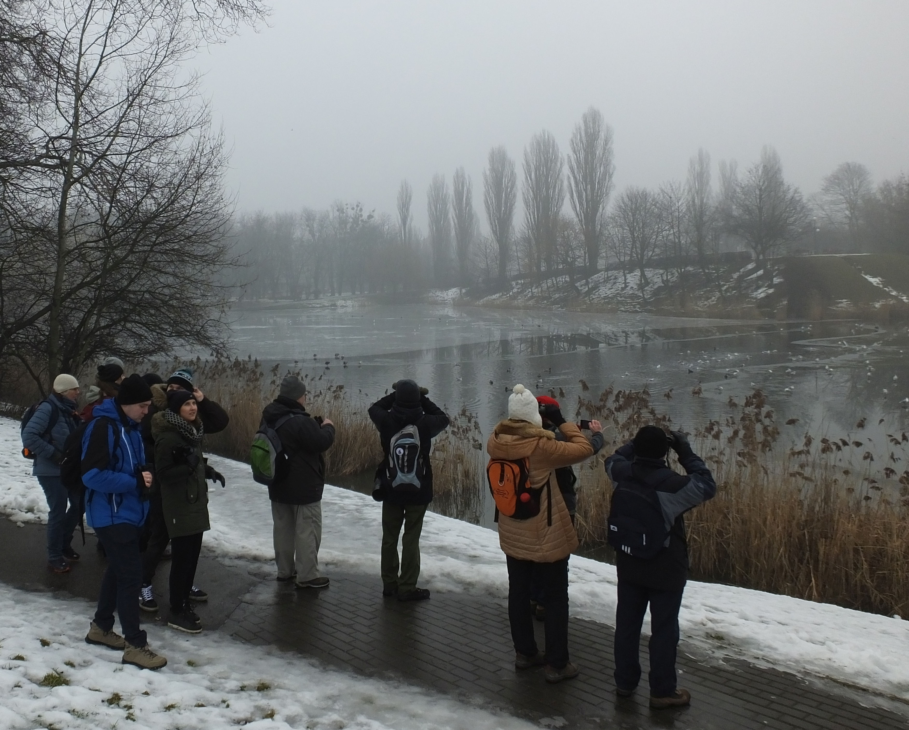 Jedna z wycieczek Zimowego Ptakoliczenia 2018 organizowanego przez Ogólnopolskie Towarzystwo Ochrony Ptaków. Warszawa, park Szczęśliwicki.